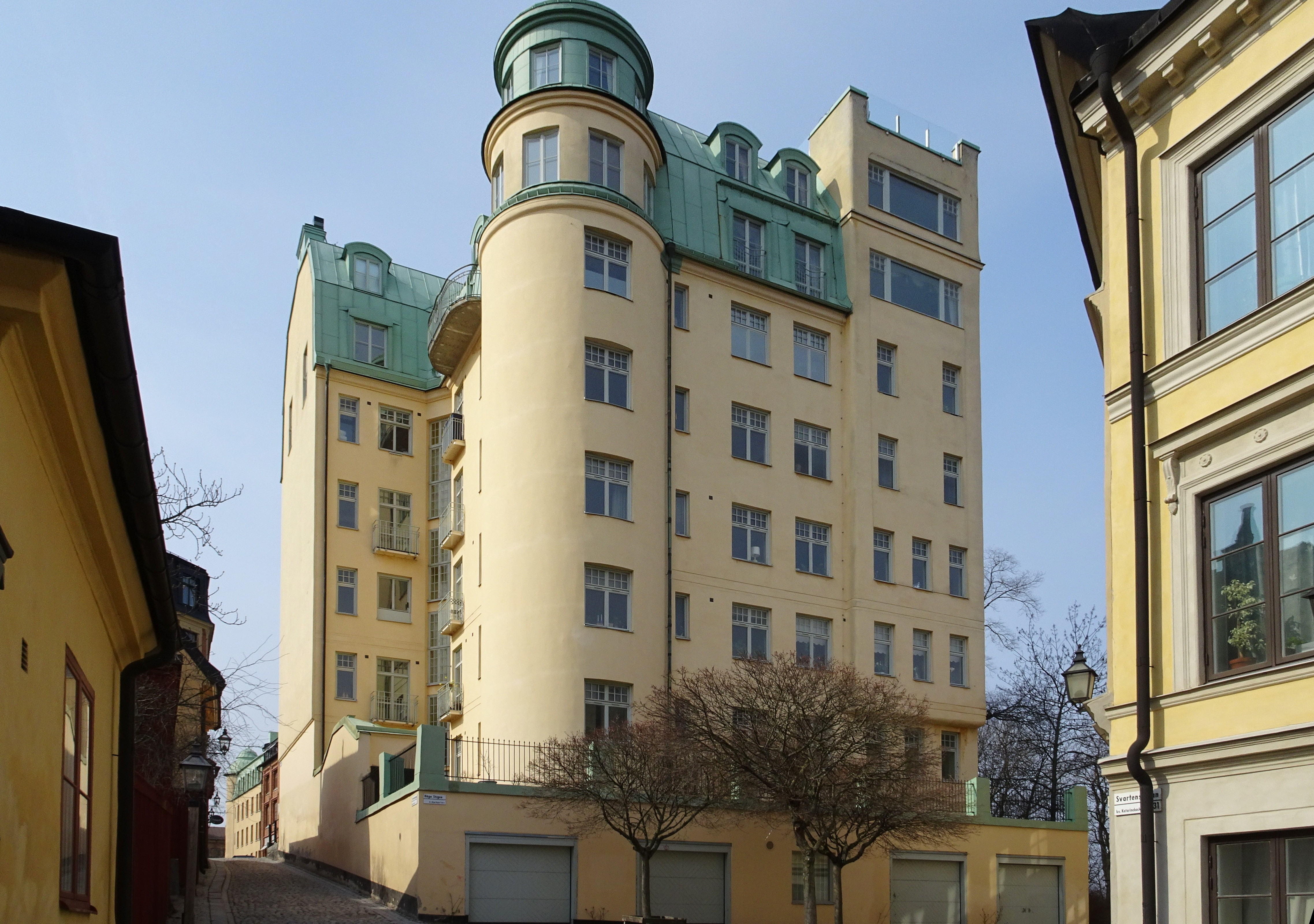 Höga Stigen Större 17, Fiskargatan 9, Svartensgatan 27-29, Uppförd 1907-1908. Arkitekt Knut Peterson, byggherre AB F Perno, byggmästare A Nordström.